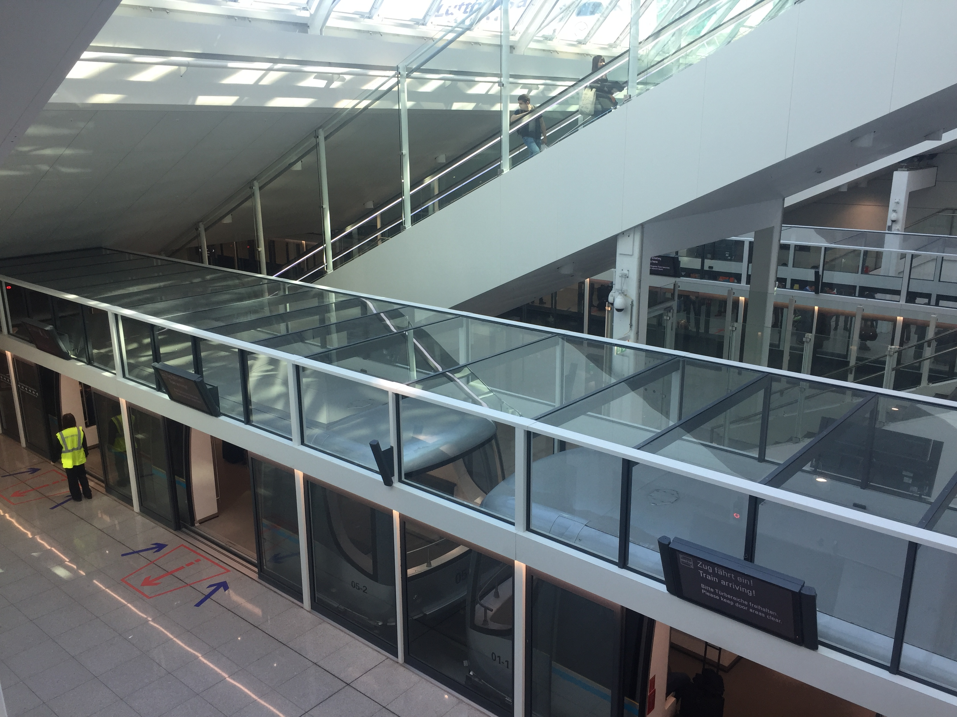 Aéroport de Munich, 2017